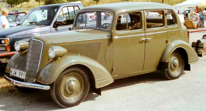 Opel 2 Liter 4-Door Limousine 1936